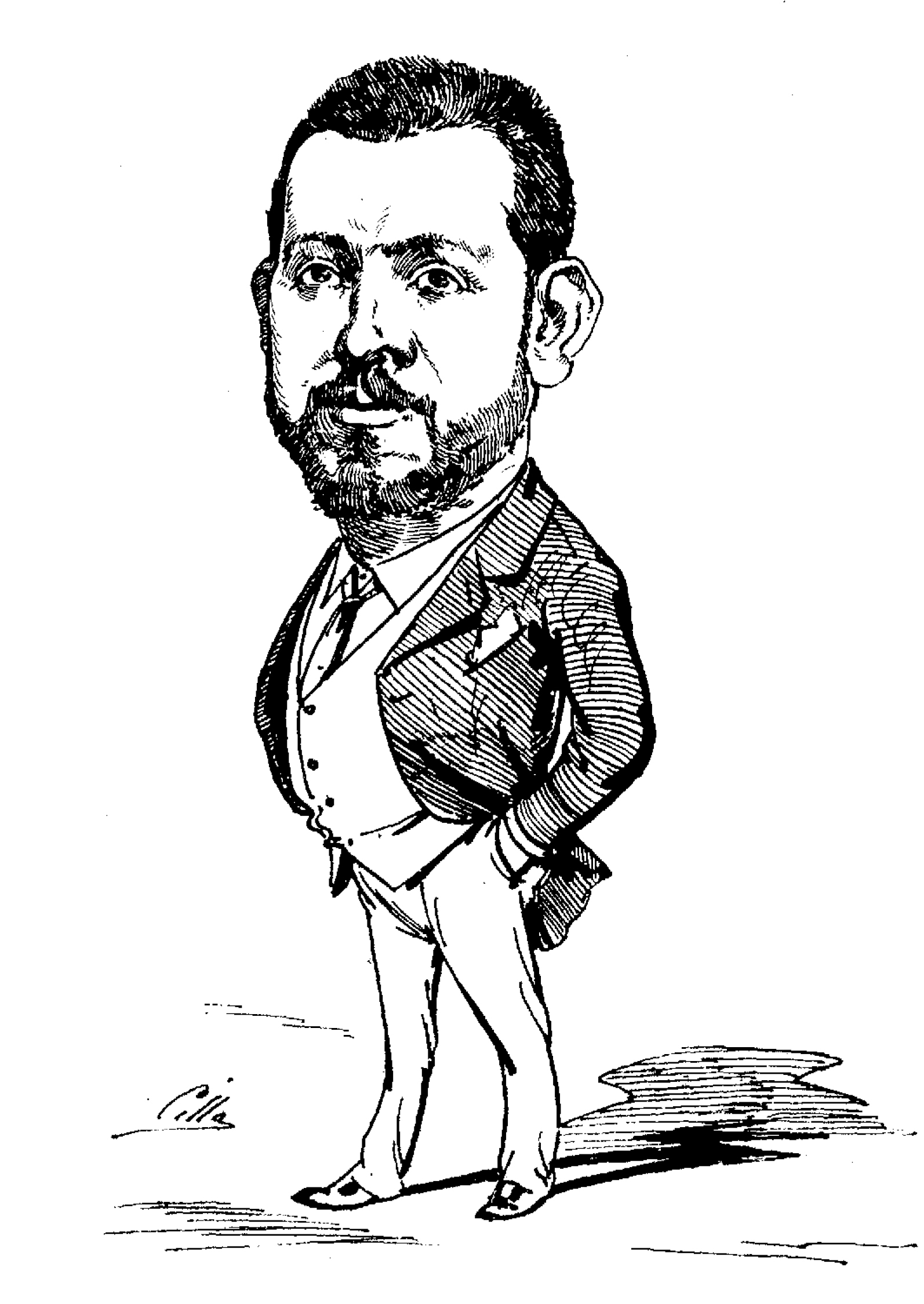 Manuel Matoses.